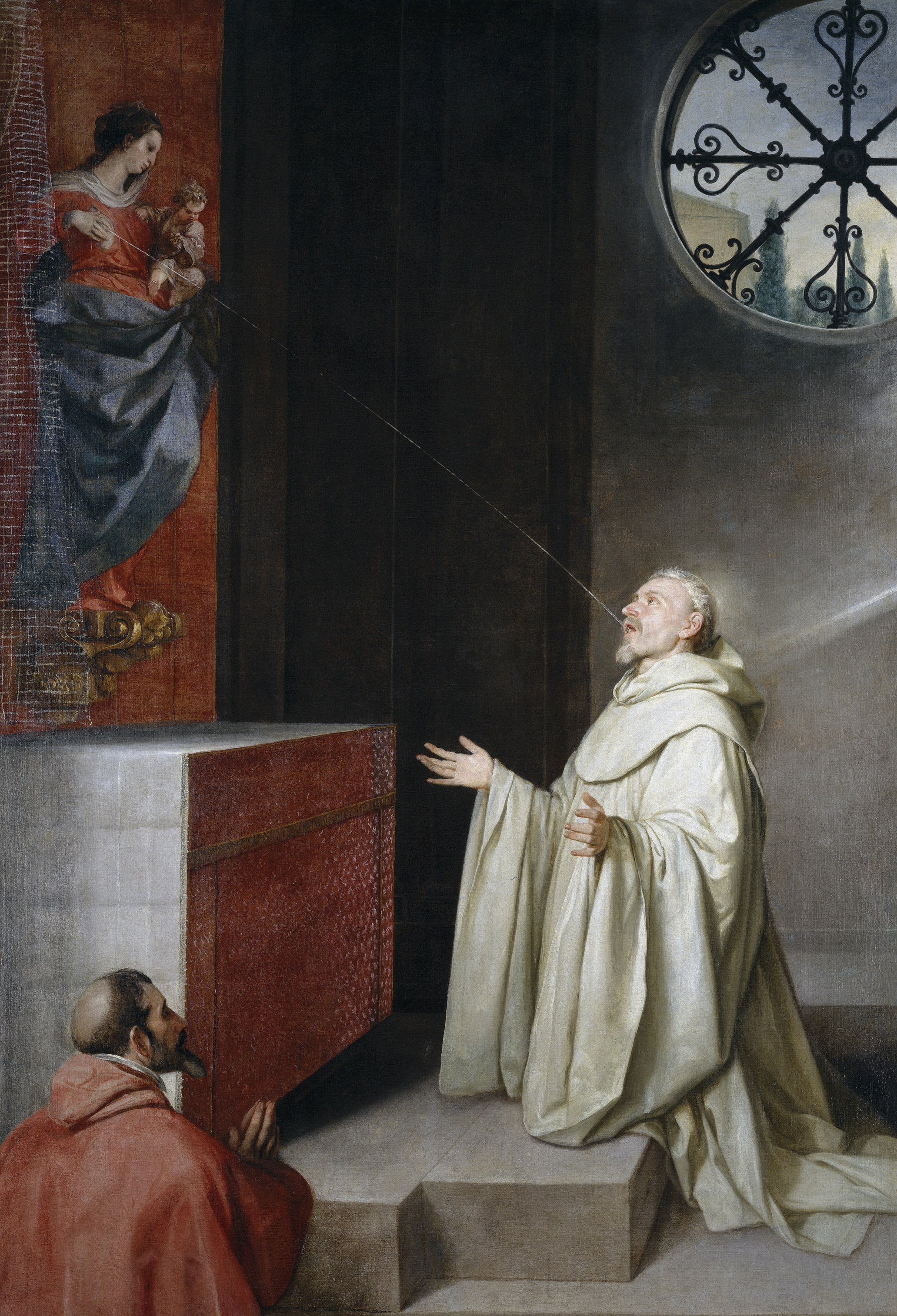 La obra representa un pasaje de la vida del monje francés San Bernardo de Claraval, que consistió en que el santo recibió en cierta ocasión un chorro de leche que brotó de una estatua de la Virgen María con el Niño Jesús, que se encontraba en un altar frente al santo, al tiempo que un cardenal aparece contemplando la escena con sus manos unidas en actitud orante.